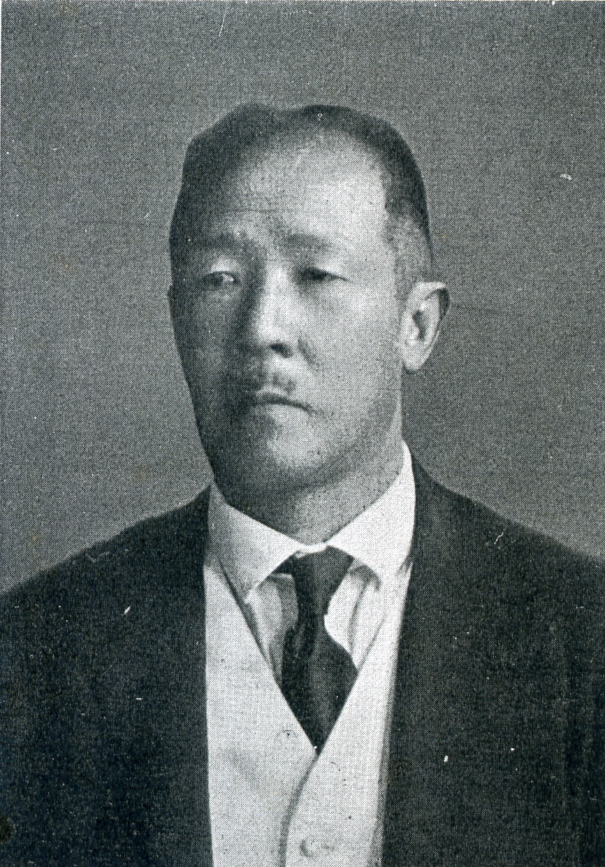 この写真は、西澤定吉（1871-1941）の写真です。